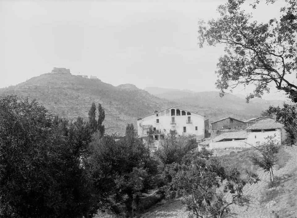 Imatge